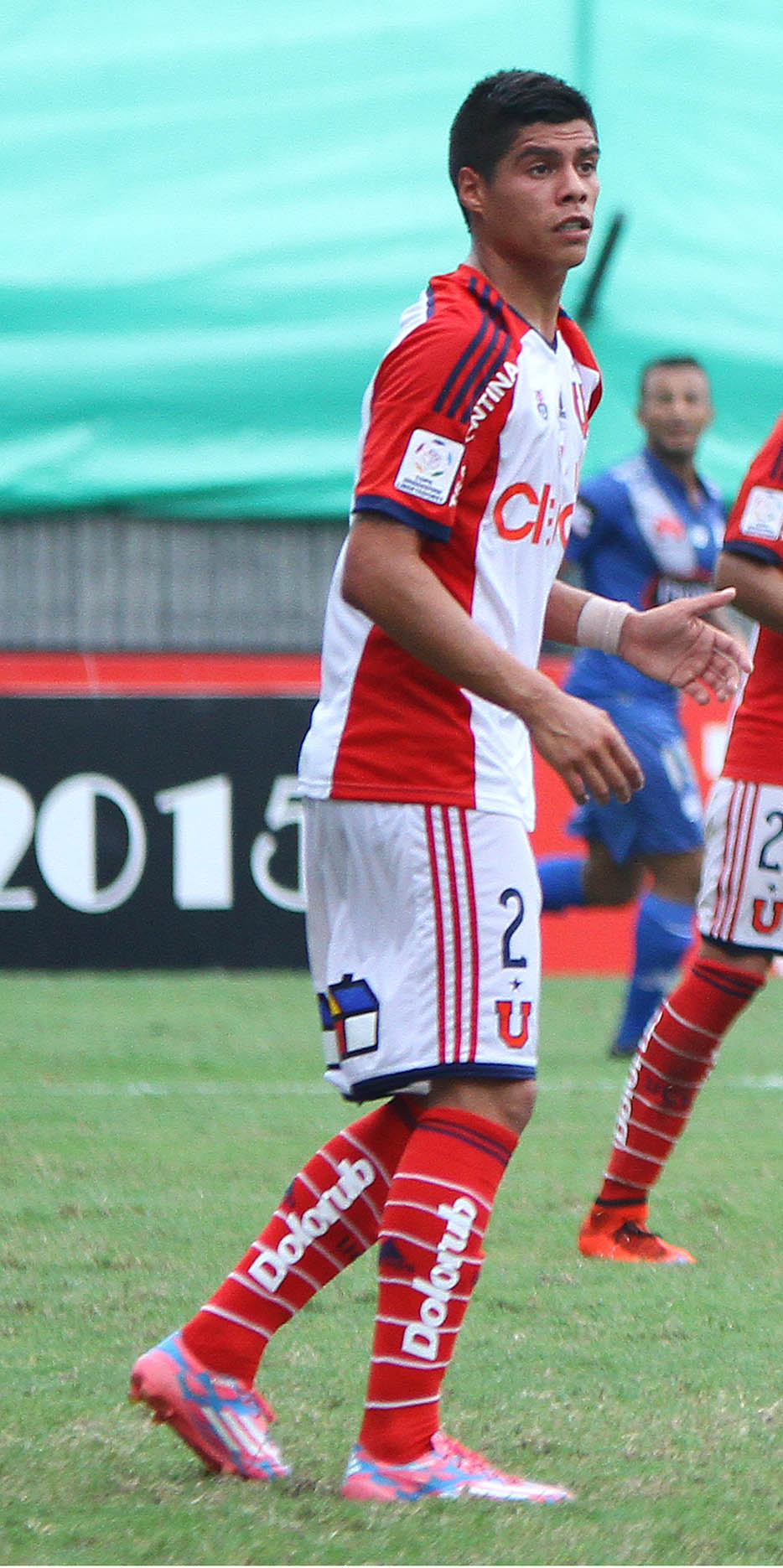 Guayaquil, 22 de abr (Andes).-Emelec gana 2x0 a la Universidad de Chile y clasifica a los octavos de la Copa Libertadores, en la gráfica Marcos Monadini remata de cabeza Foto:César Muñoz/Andes